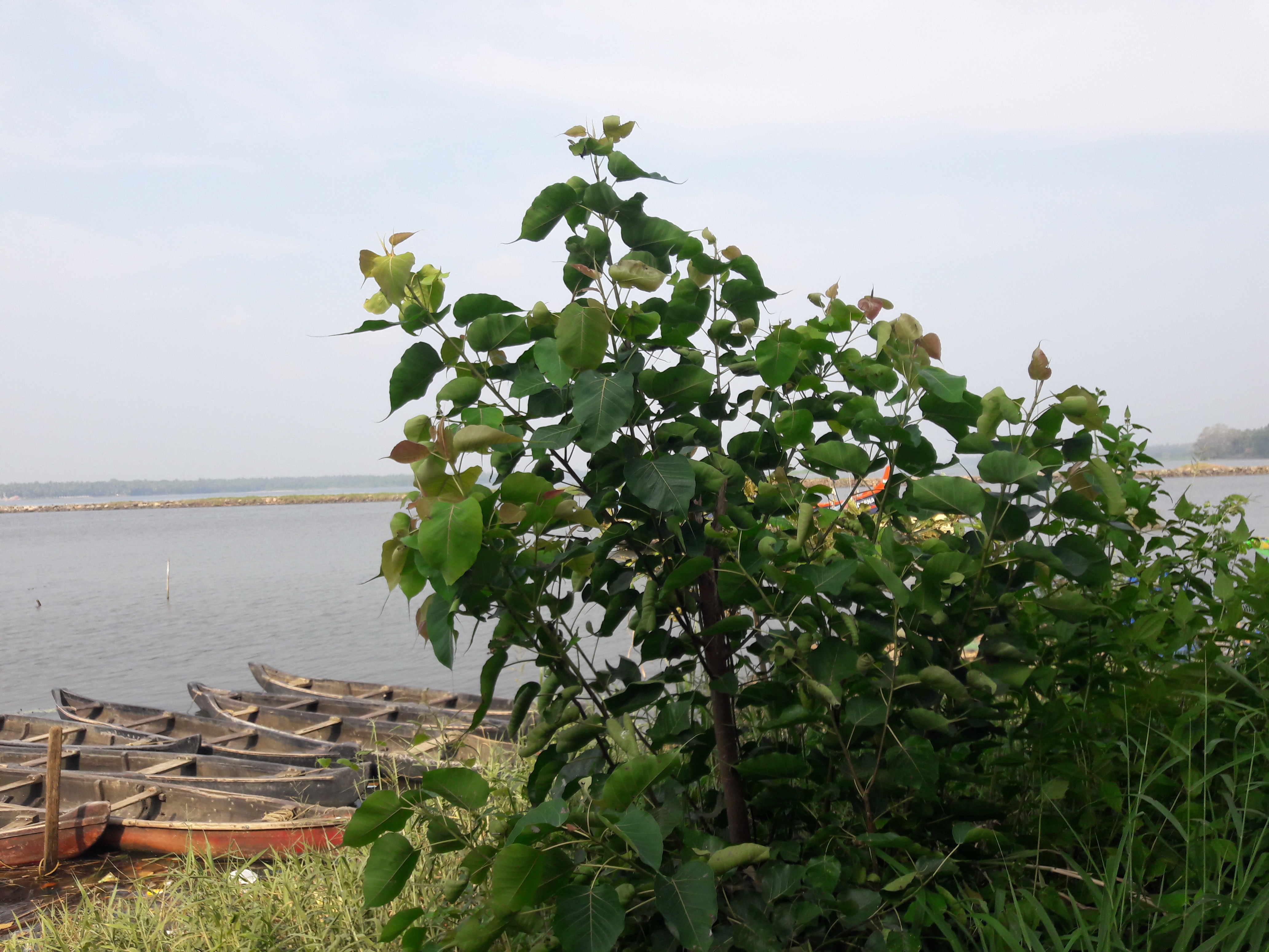 ഭാരതപ്പുഴയ്ക്കരികില്‍ ഒരു അരയാല്‍ വളരുന്നു.Peepal tree ശാസ്ത്രീയ നാമം Ficus religiosa കുടുംബം Moraceae.